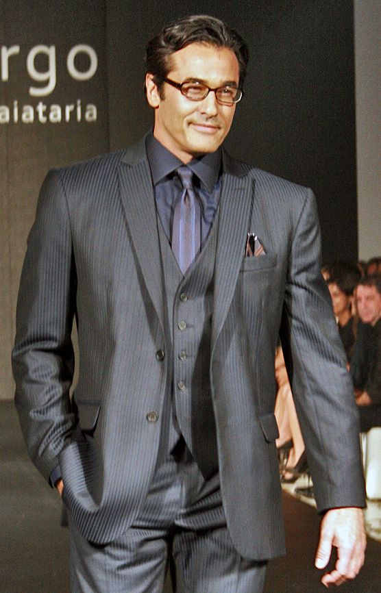 Luciano Szafir, ator brasileiro